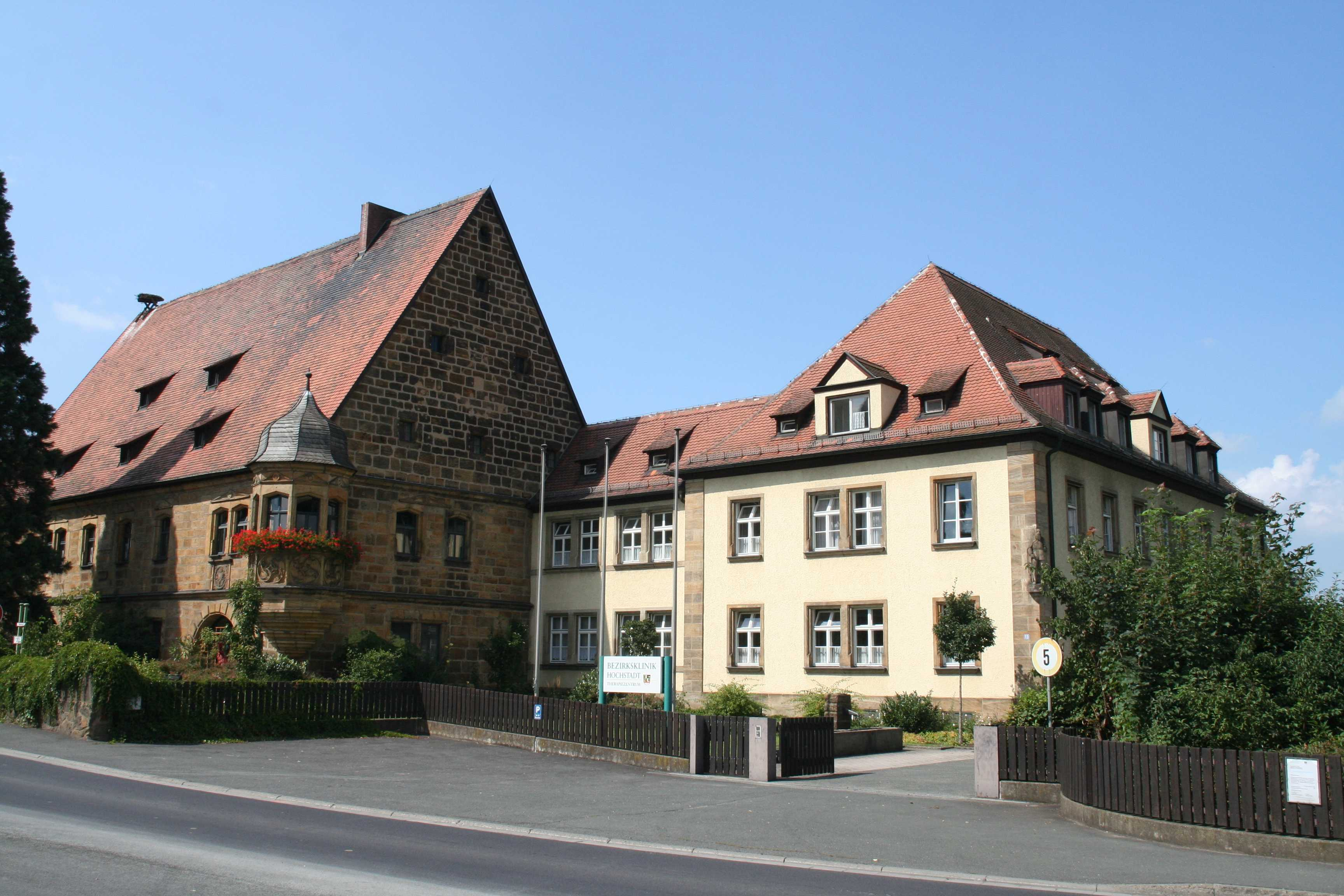 Bezirksklinik Hochstadt am Main im Landkreis Lichtenfels in Bayern